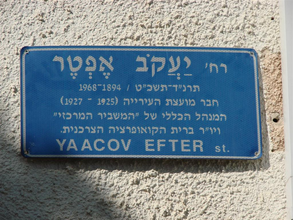 שלט רחוב יעקב אפטר - תל אביב